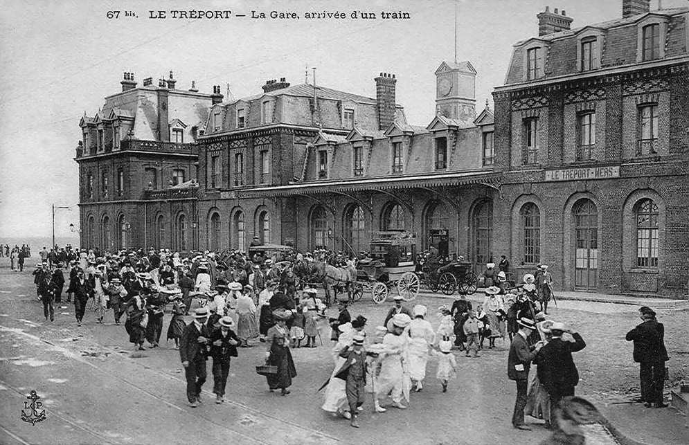 Carte postale ancienne éditée par LP, n°67 bis : Place et gare du Tréport - Mers lors de l'arrivée d'un train de plaisir au début des années 1900.